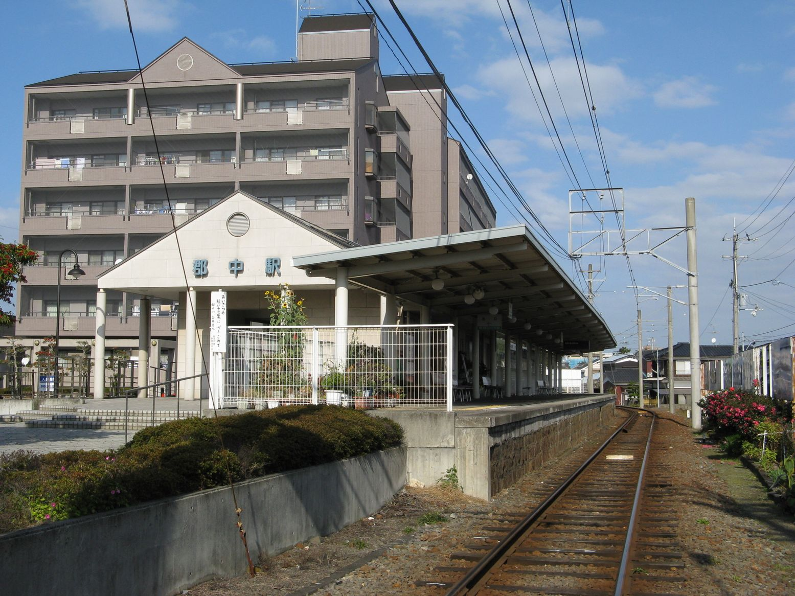 伊予鉄道郡中線郡中駅